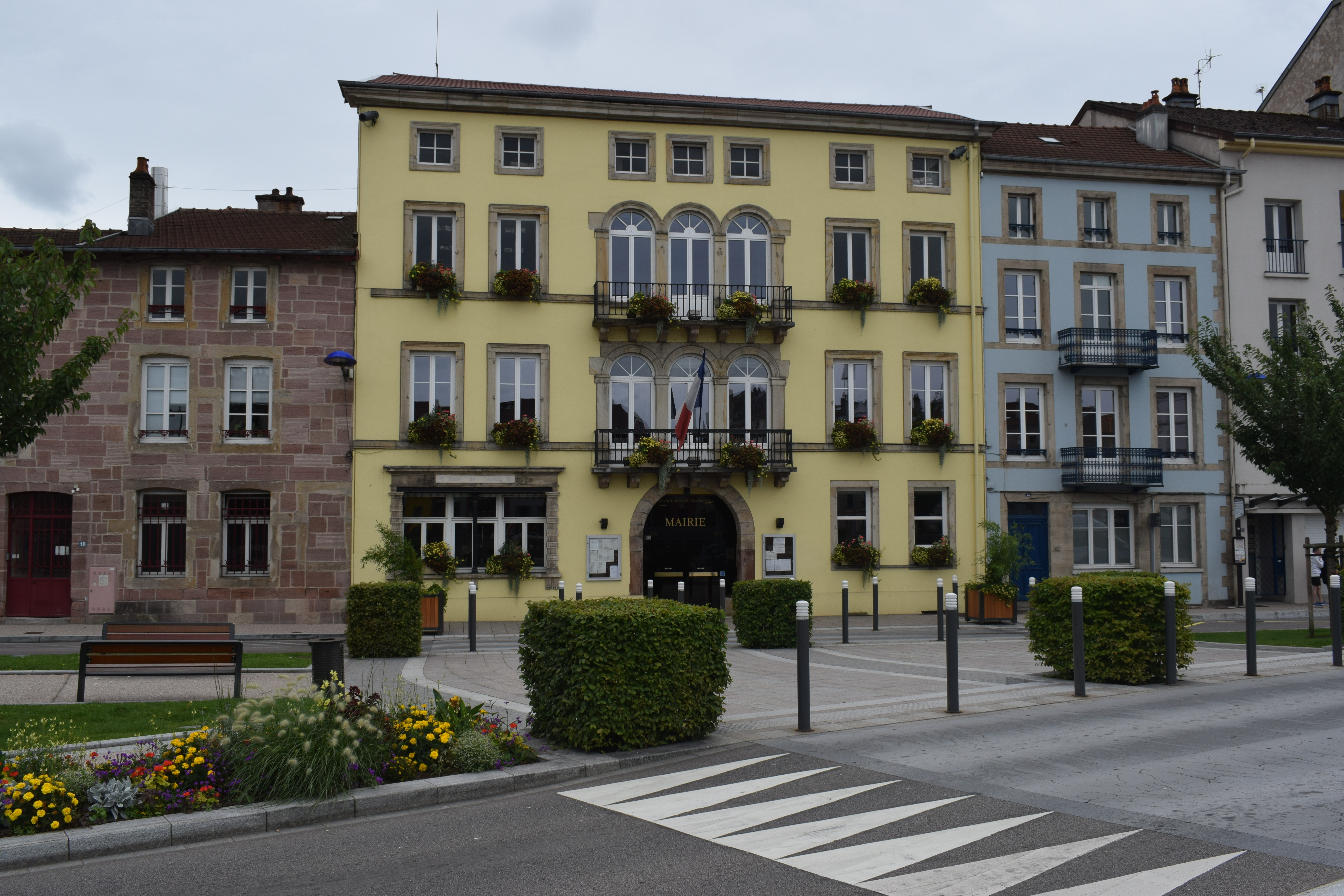 Vue d'Épinal, dans le département des Vosges en France.